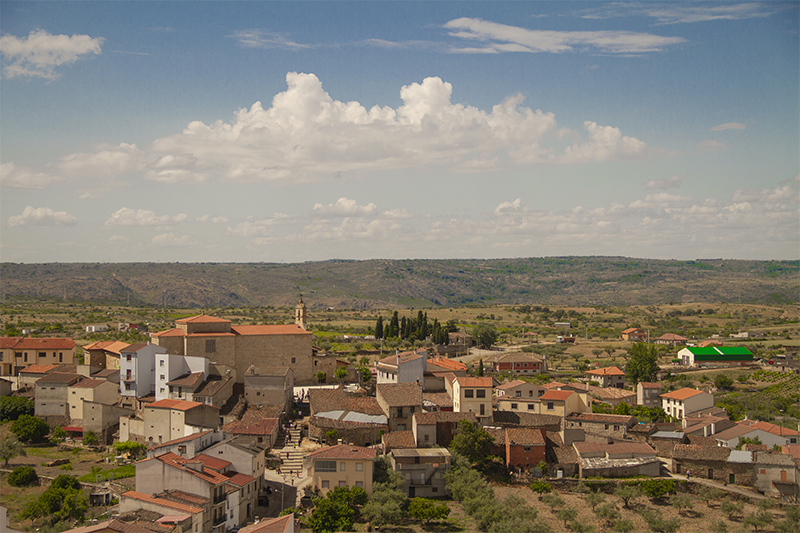 Zona sur de la localidad de Fermoselle, en la provincia de Zamora, Castilla y León, España